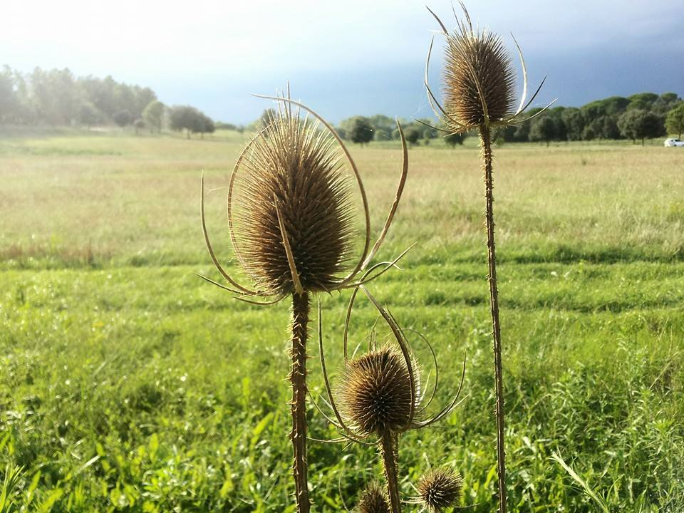 Campo de cultivo ecológico y sostenible